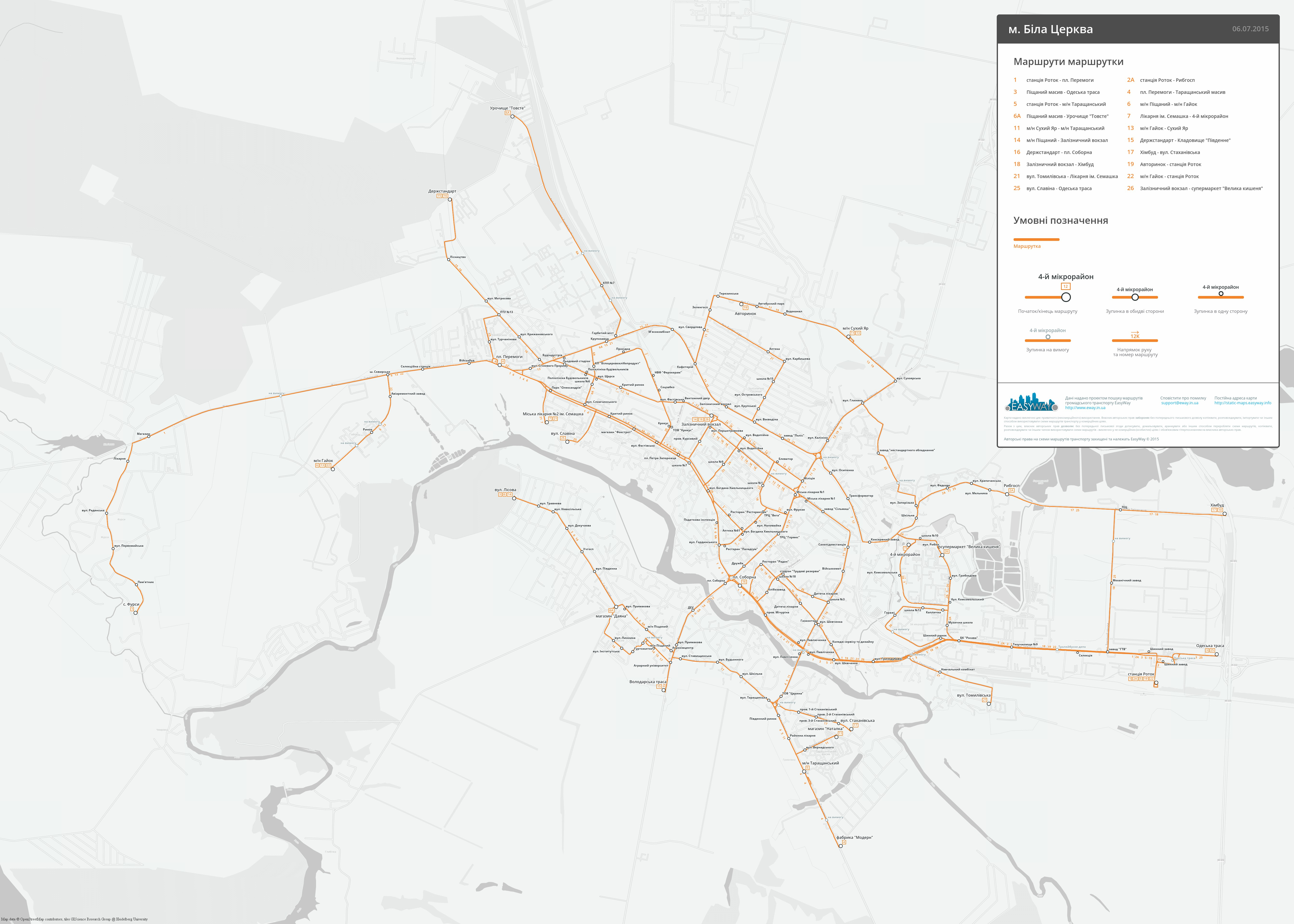 Схема маршрутного таксі у Білій Церкві